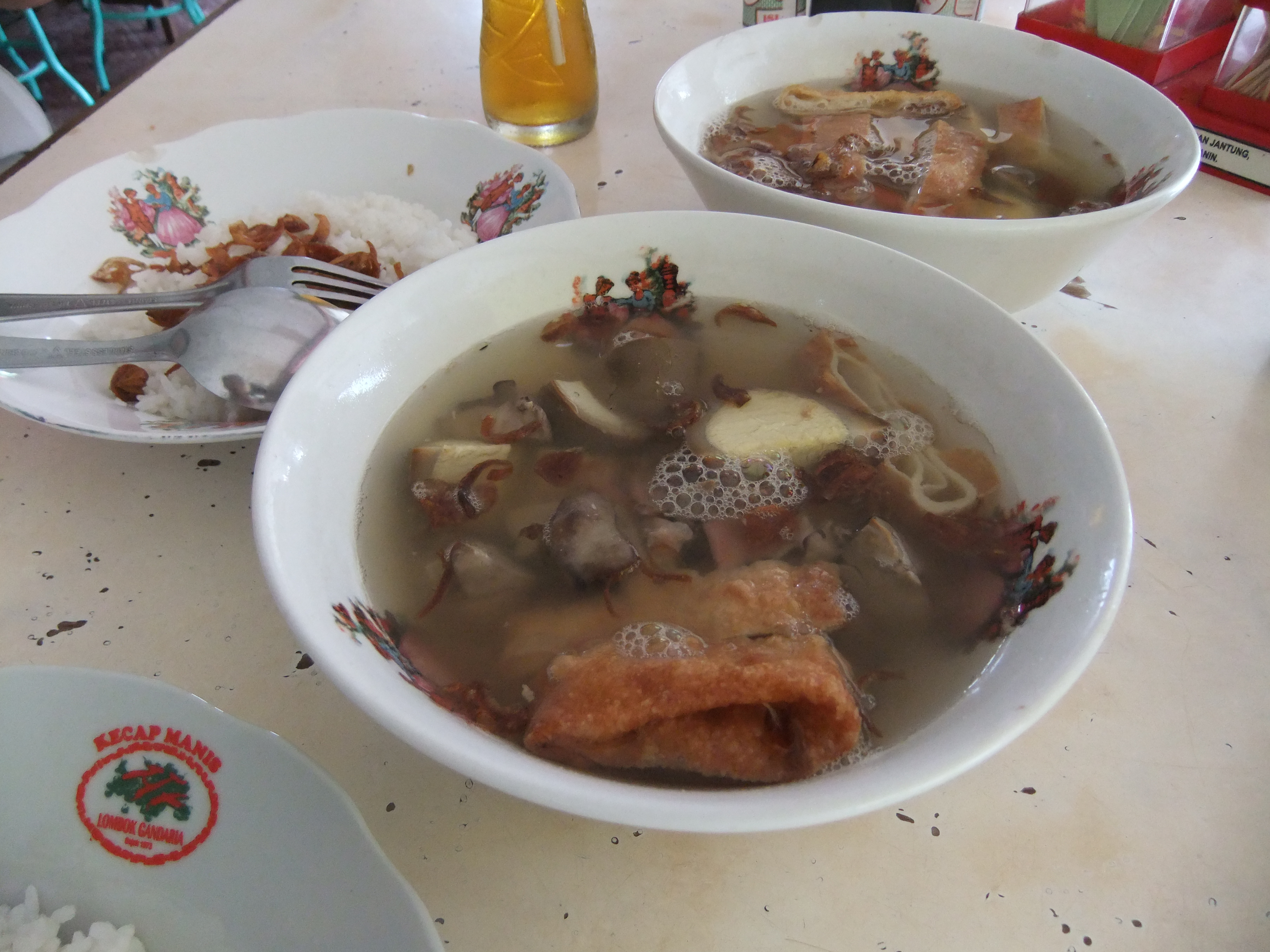 Timlo Solo, Sastro